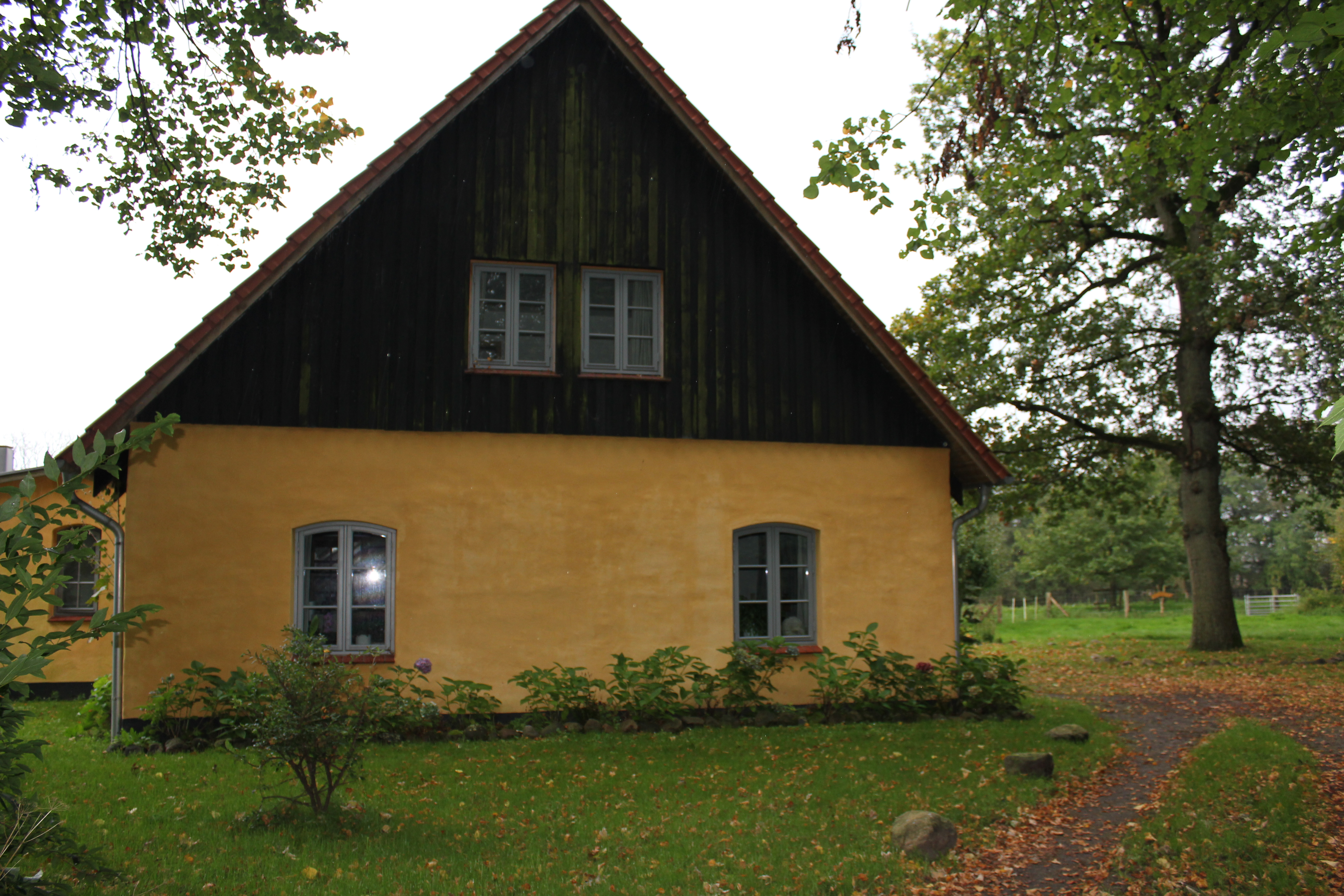 Hof Vogelsang (Flensburg, 2011)